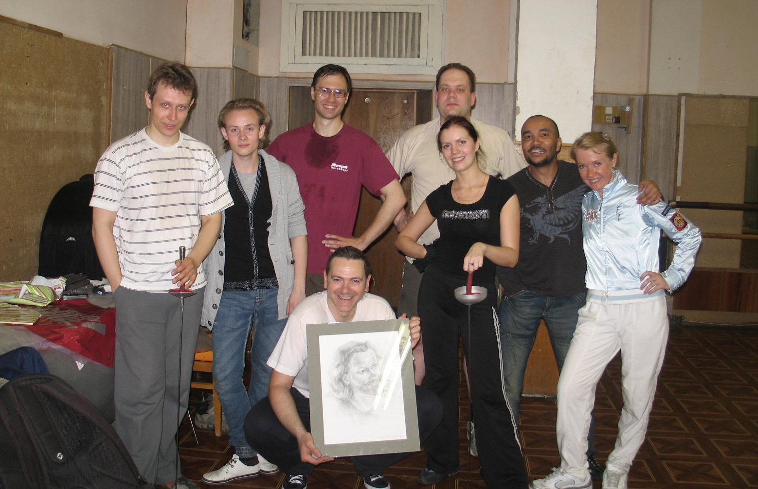 Андрей Рыклин с учениками (Кирилл Парменов, Дмитрий Заботин, Николай Голубев, Анатолий Петрыкин, Юлия Шиферштейн, Григорий Сиятвинда, Яна Аршавская) Москва, Дворец на Яузе, 2012 г.